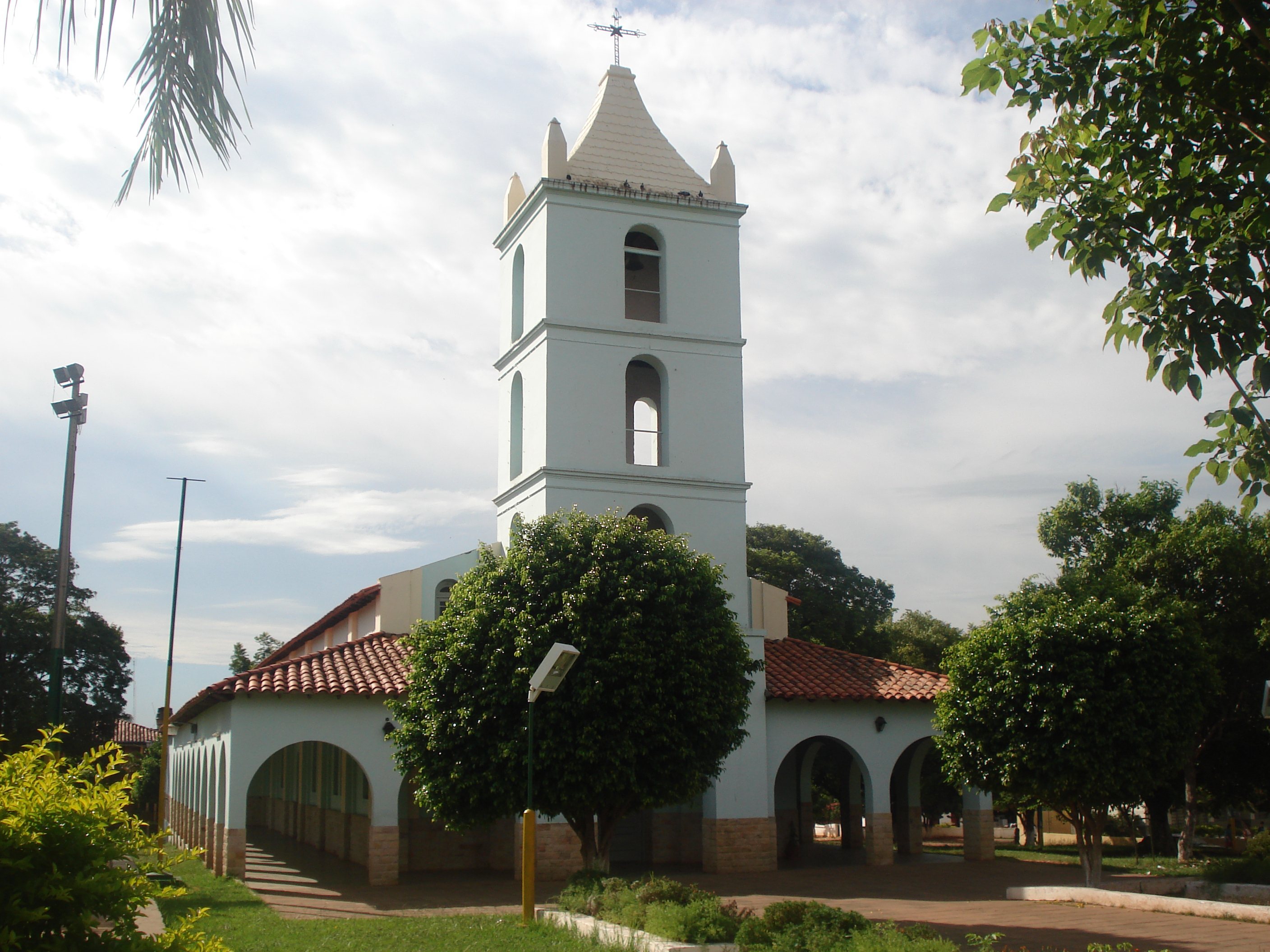 Iglesia de la Ciudad de Ypane